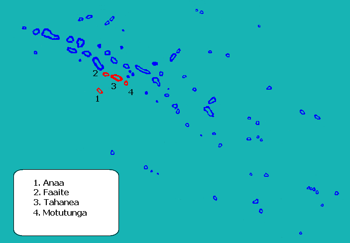 Mapa de localització de la comuna d'Anaa a l'arxipèlag Tuamotu, Polinèsia Francesa.